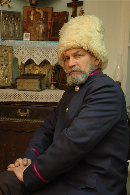 В музее Старый Урасльскъ.